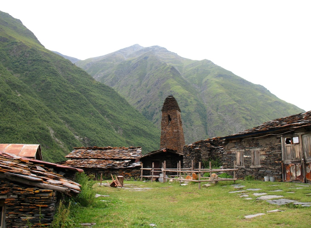 Farsma